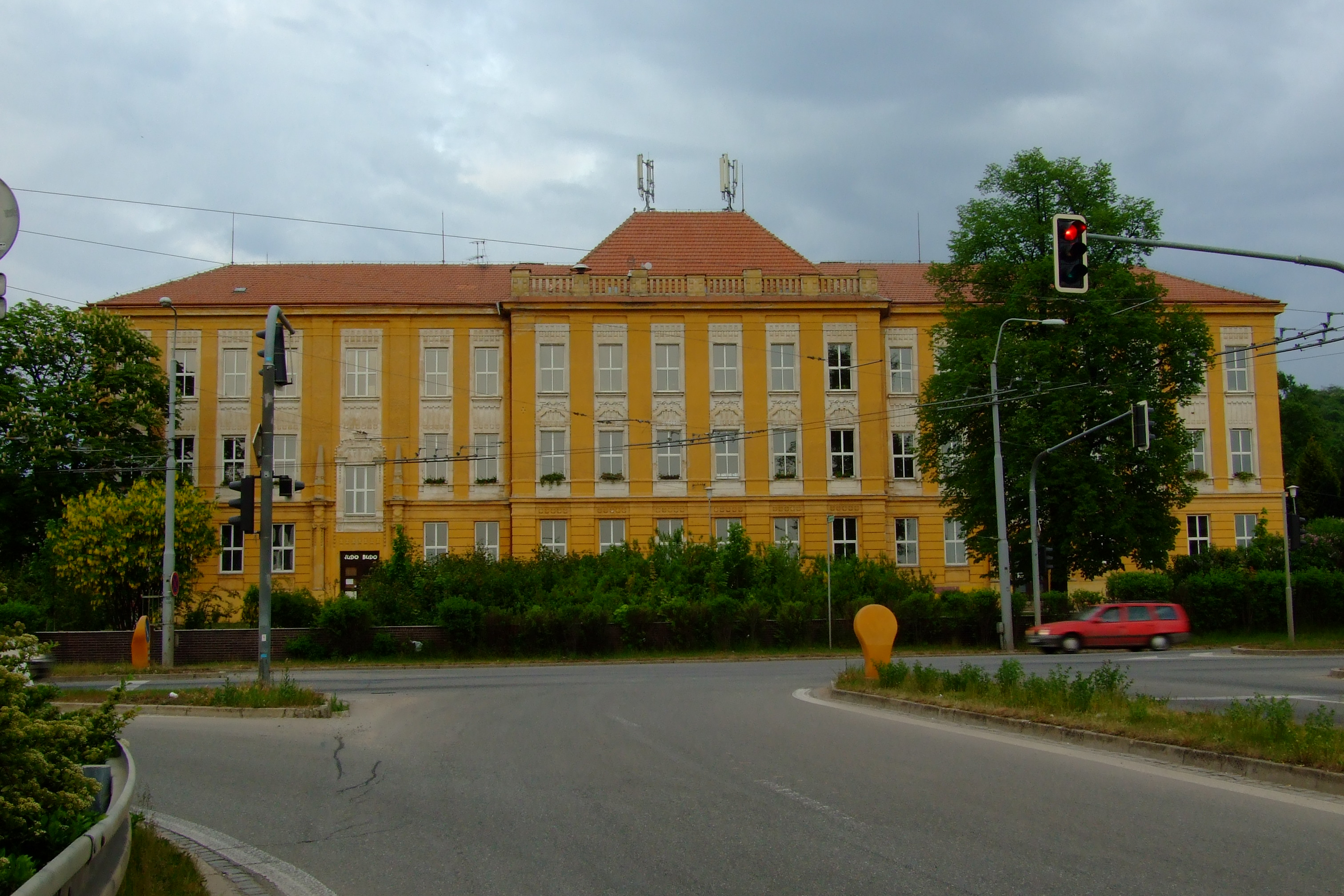 Základní škola Gajdošova 3 v Brně-Židenicích